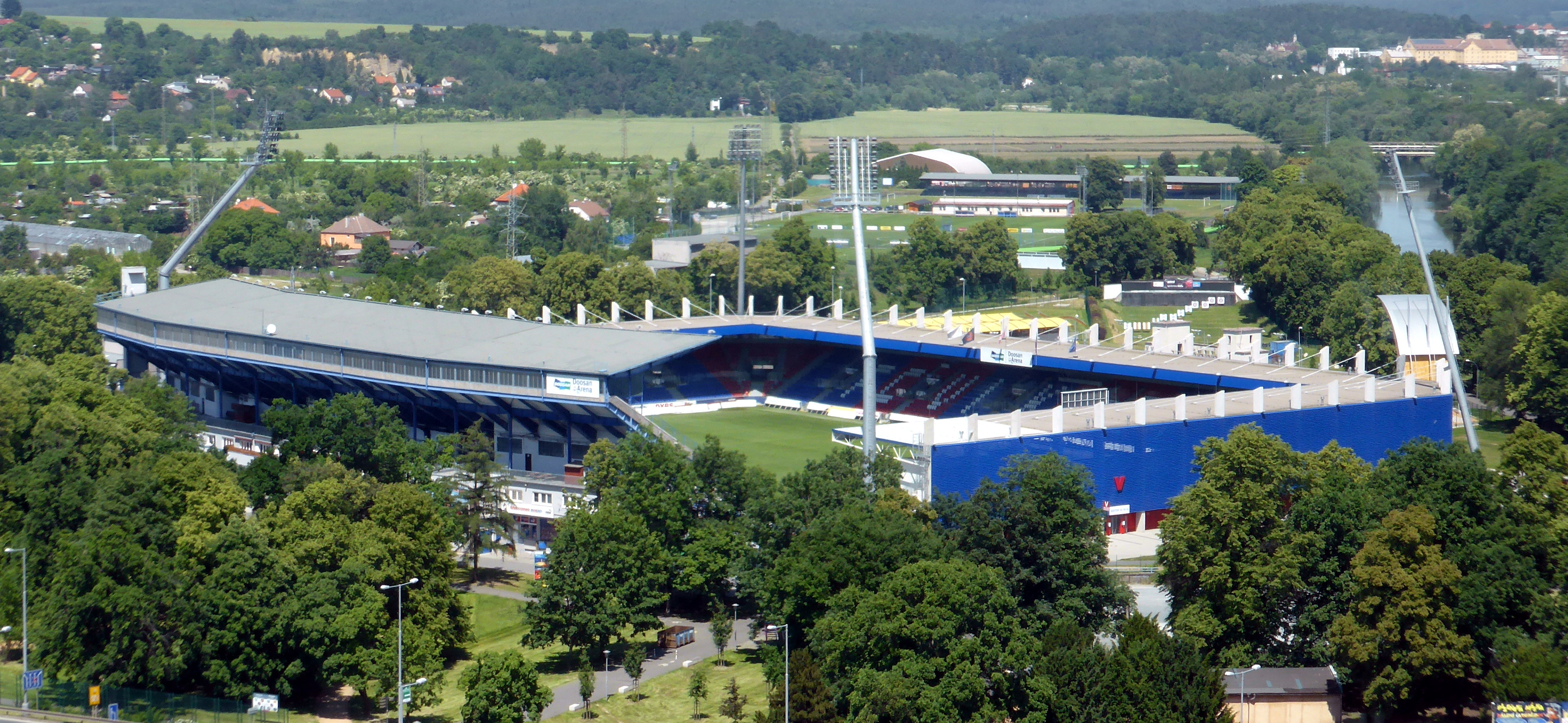 Fotbalový stadion (takzvaná arena) v Plzni (střih).